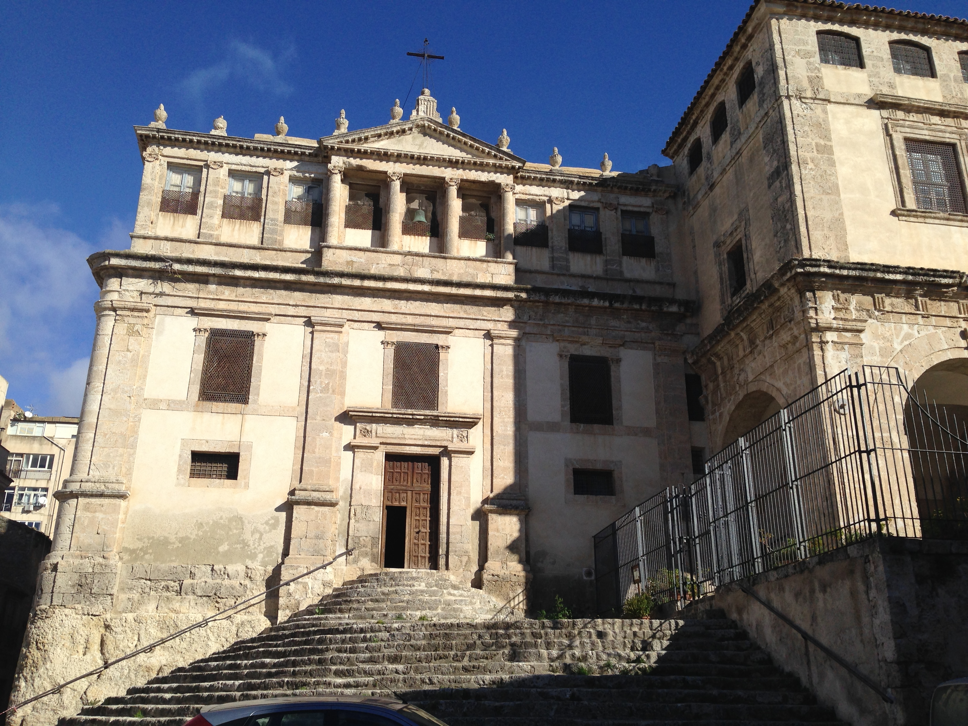 Monastero delle Benedettine - Palma di Montechiaro